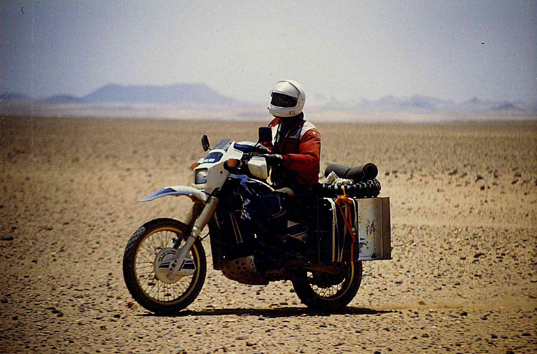 DR600 in der algerischen Saharah